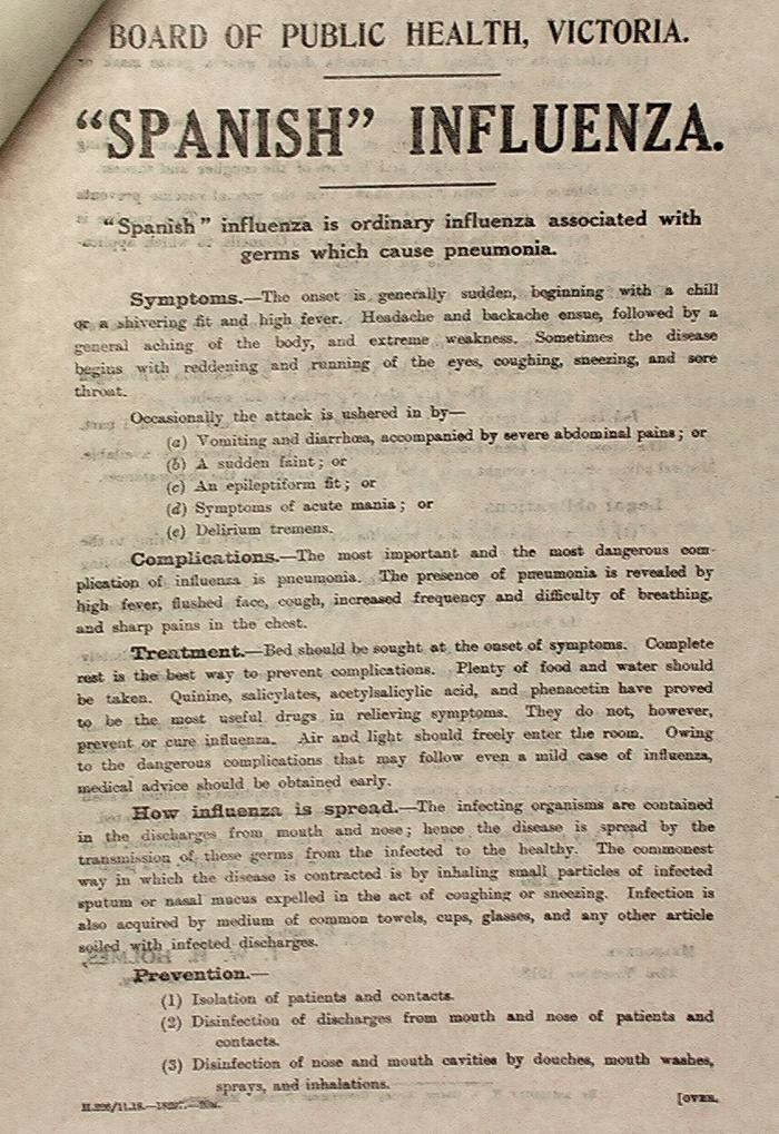 Spanish Influenza leaflet, 1918 (Australia)